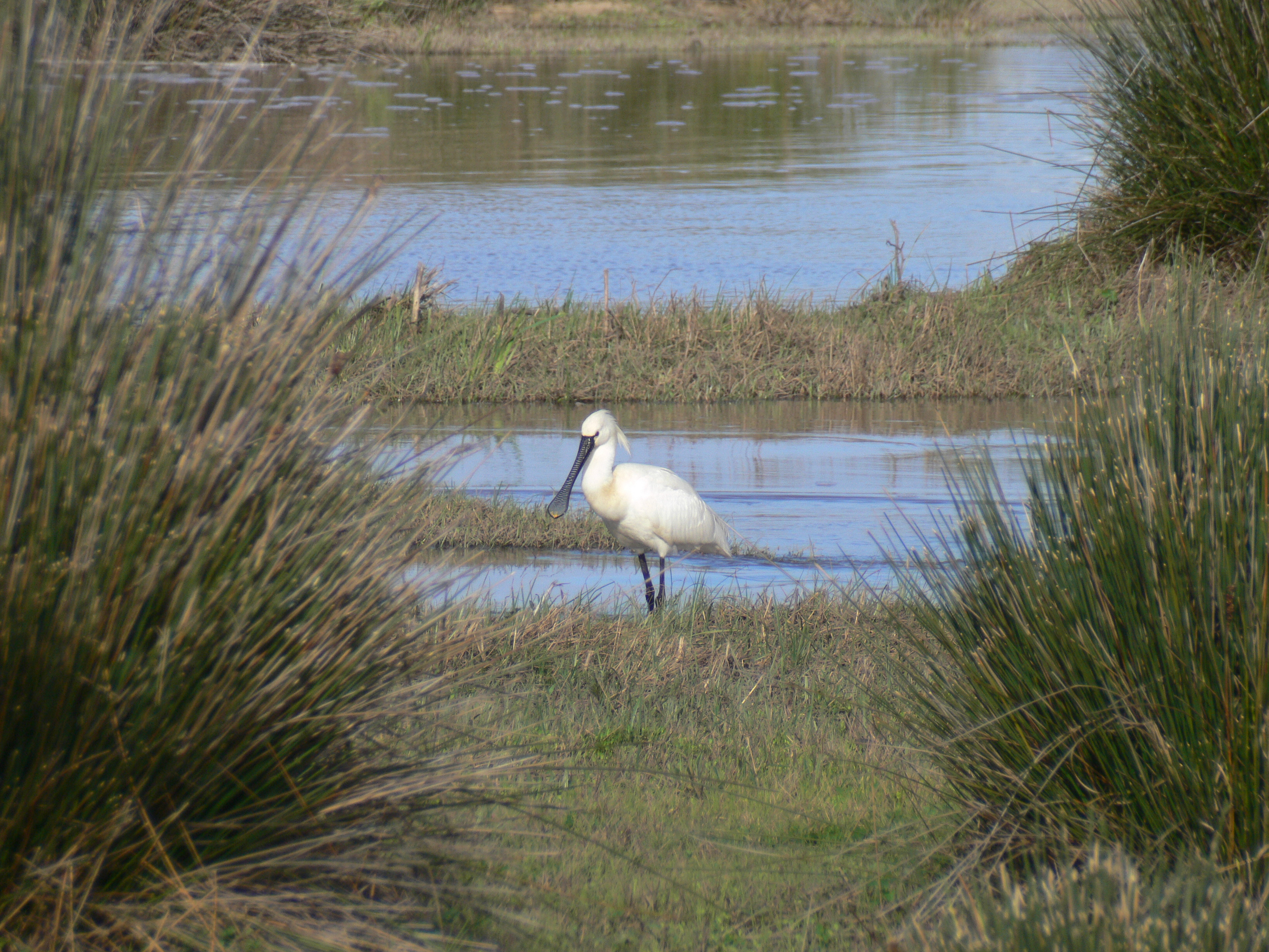 fotografie kolpíka